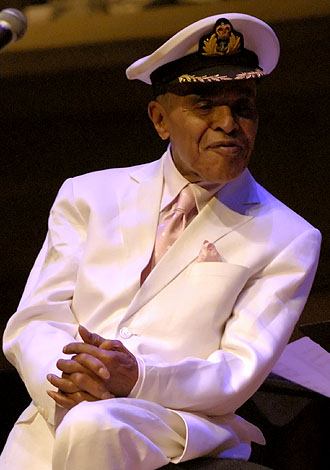 Jon Hendricks